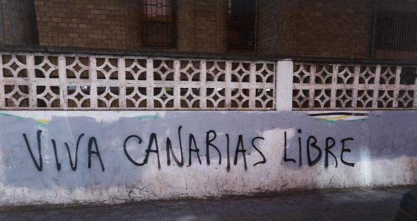 Graffiti in La Laguna, Tenerife (Spain)